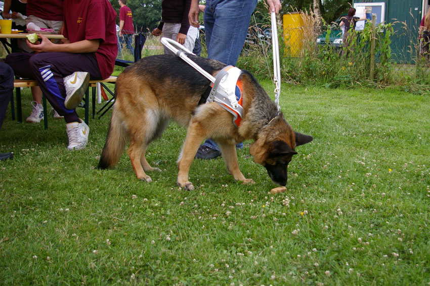 Deutscher Schäferhund als Blindenhund